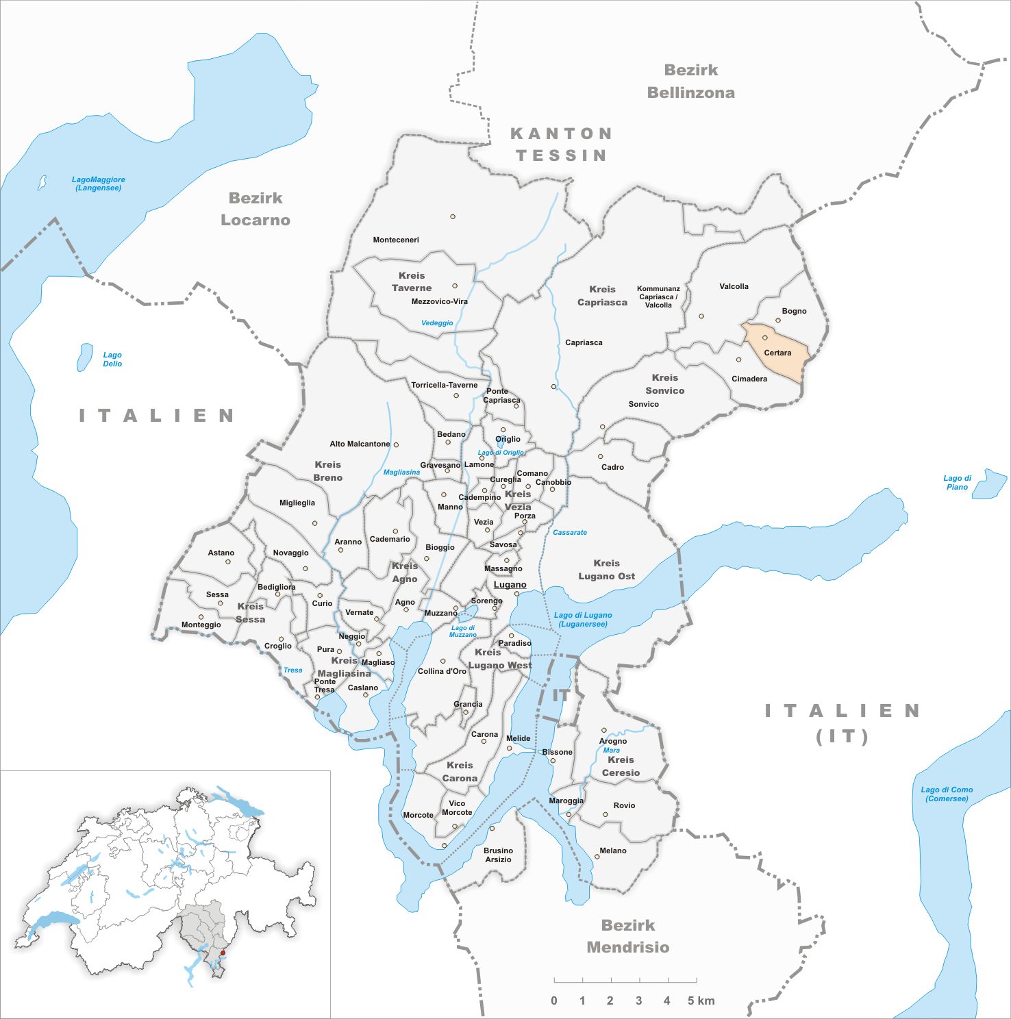 Municipality Certara